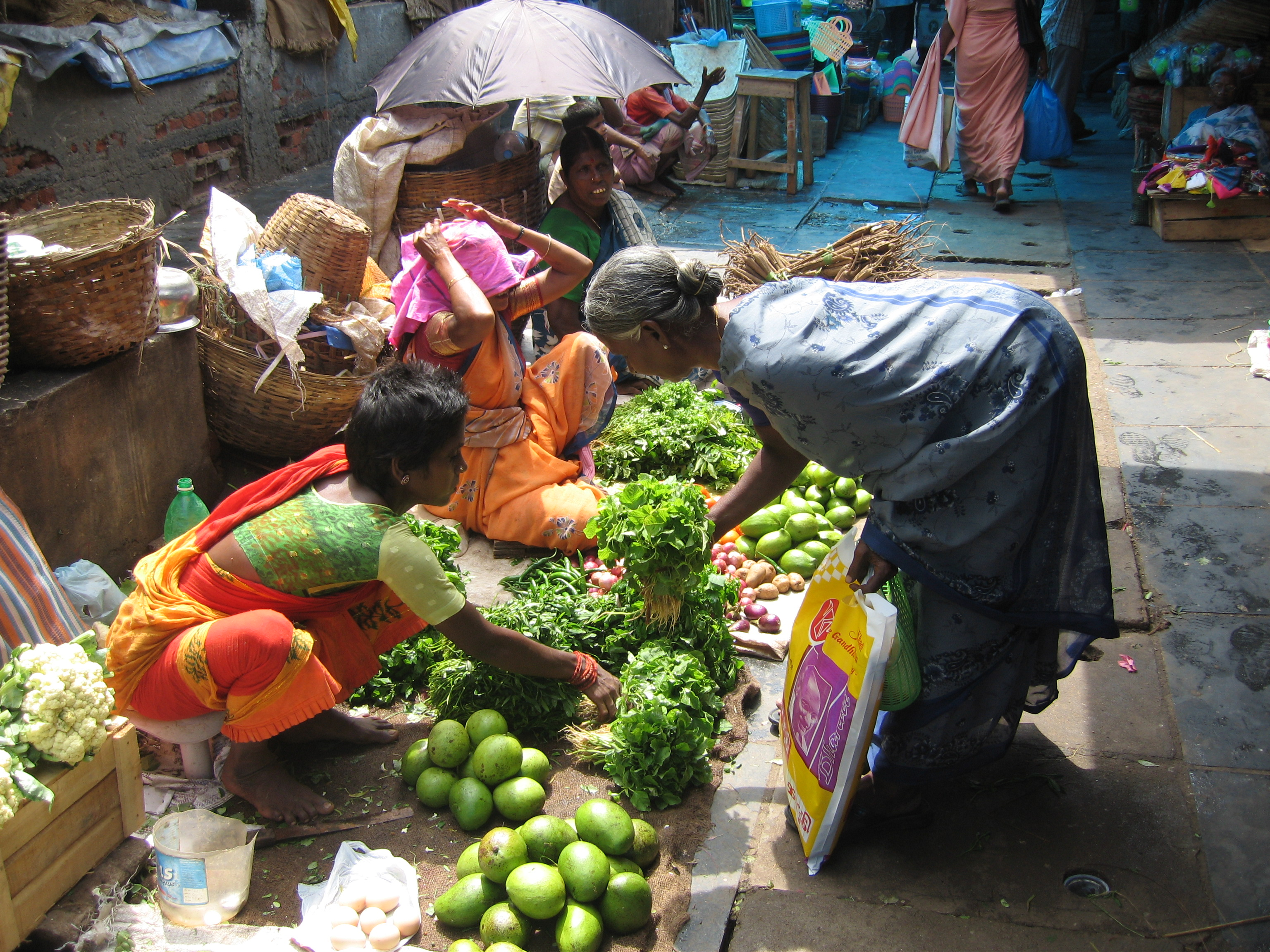 புதுவையில் பிரபலமான குபேர் சந்தையில் ஒரு காட்சி.